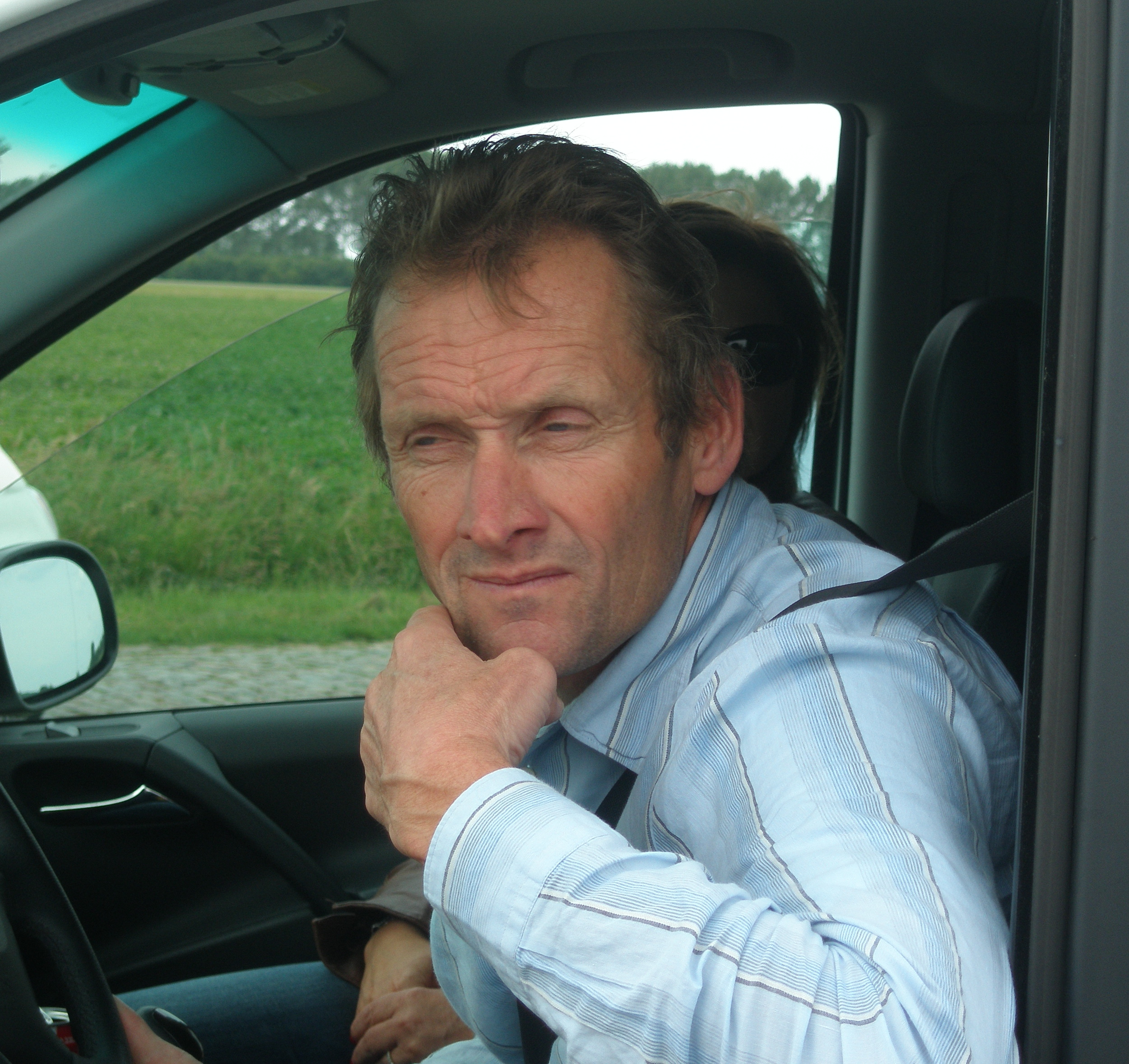 Adrie van der Poel tijdens de Deltatour 2011.